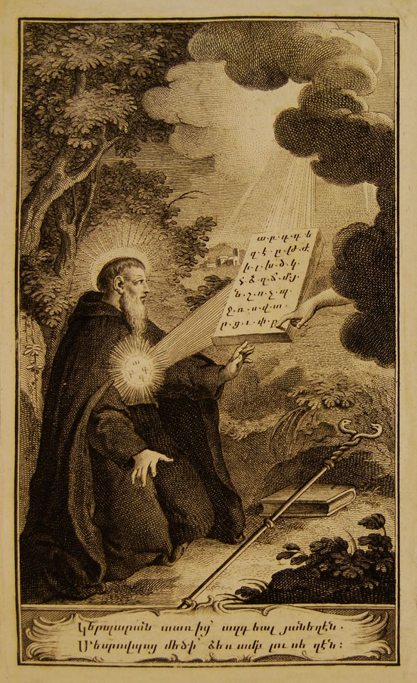 Чамчян М. Грамматика армянского языка / М. Чамчян. – Венеция : тип. Д. Теодосеянца, 1779.